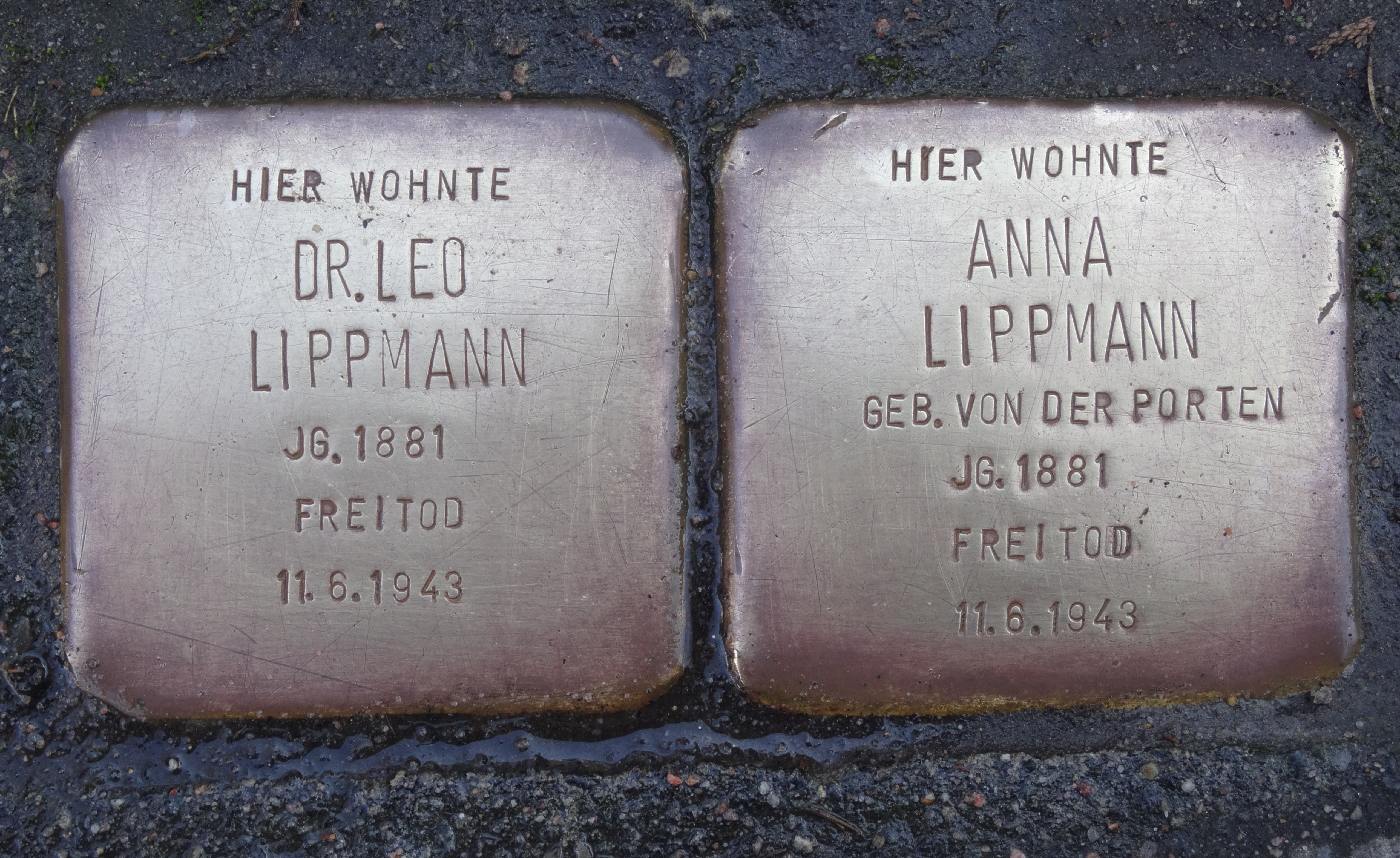 Stolpersteine für Anna und Leo Lippmann vor dem Haus Böttgerstraße 5, wo sie gewohnt hatten und 1943 Selbstmord begingen, um zu verhindern, nach Theresienstadt zu kommen.